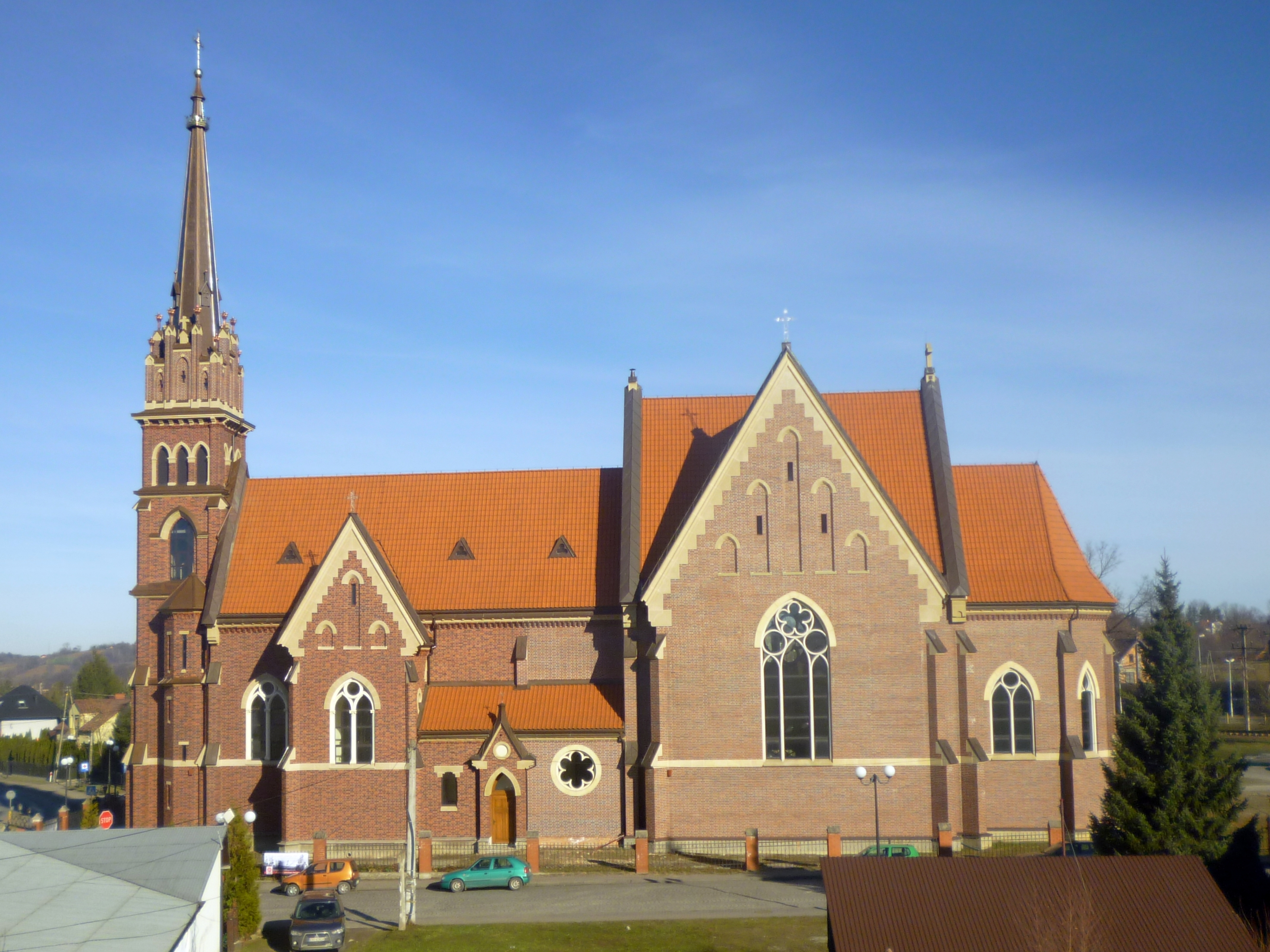 Kościół pw. Najświętszej Maryi Panny Królowej Polski w Stróżach